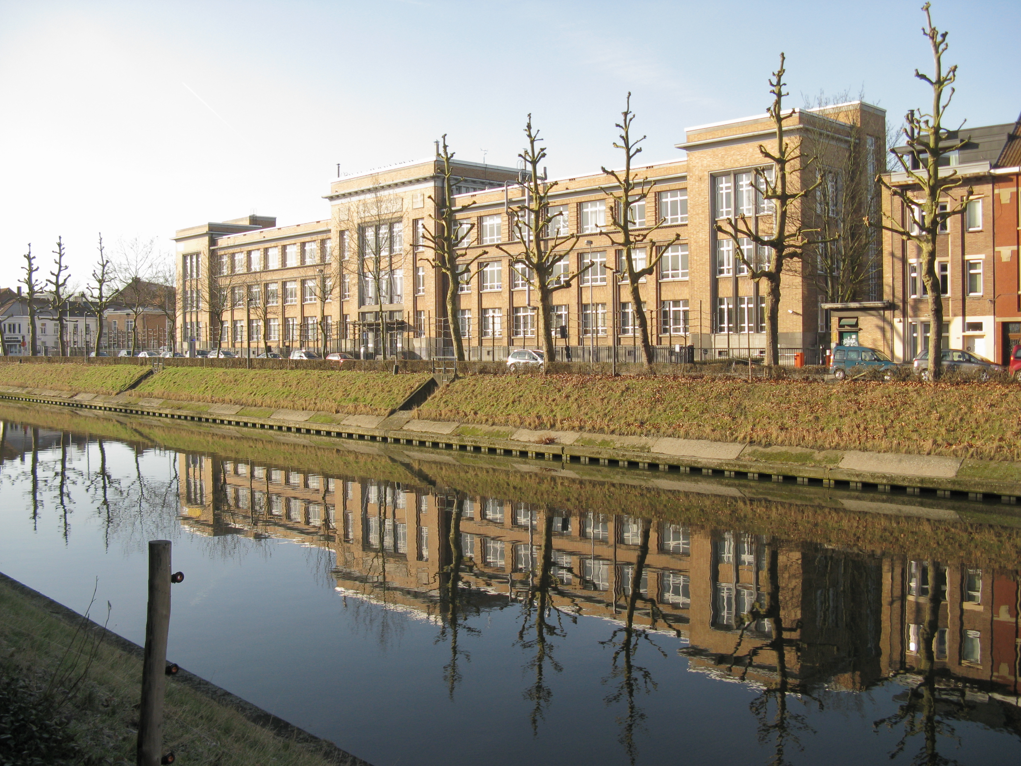 Het kanaal "Coupure" in Gent, België.